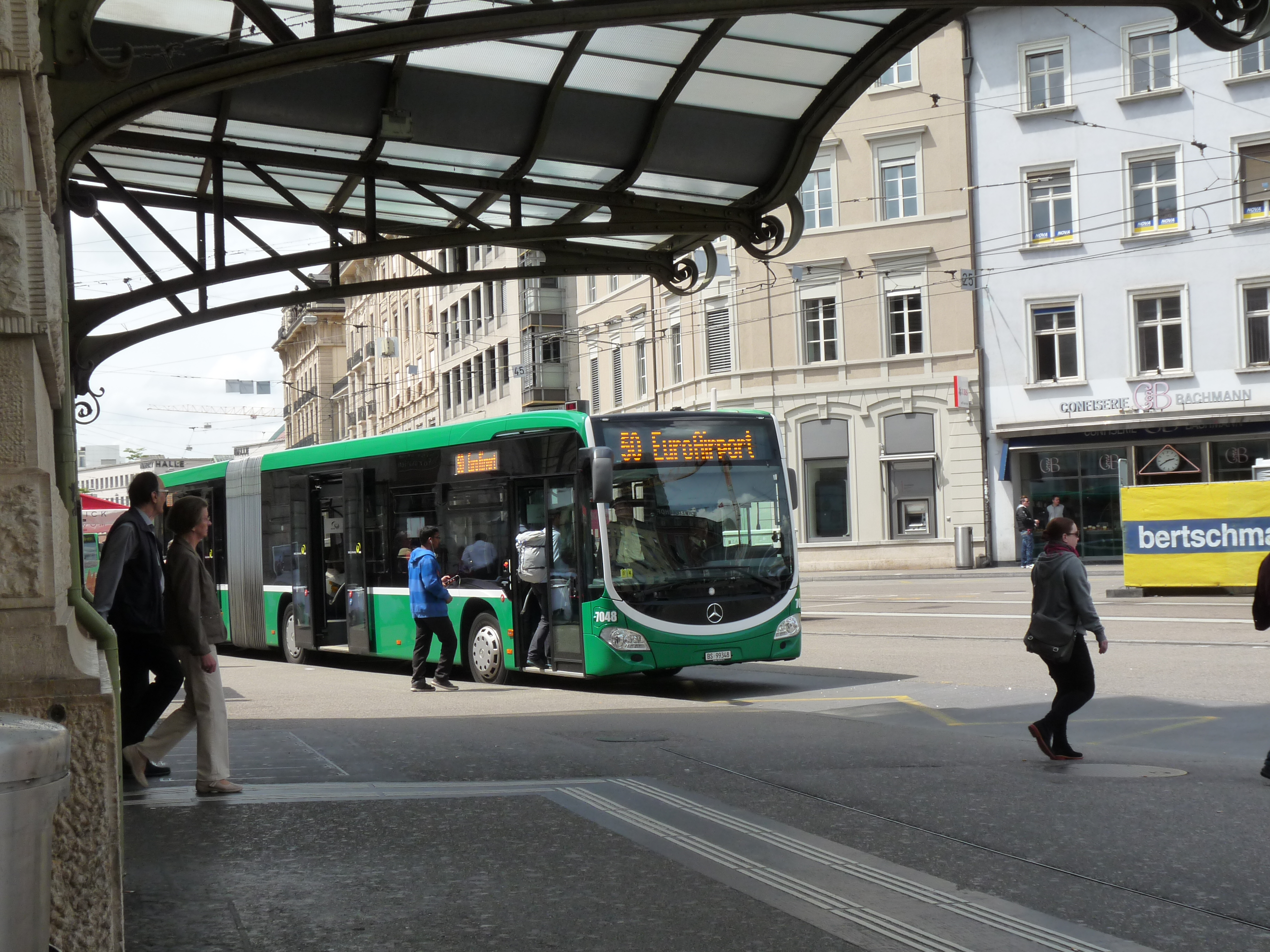 De expres busroute naar de vlieghaven in Bazel